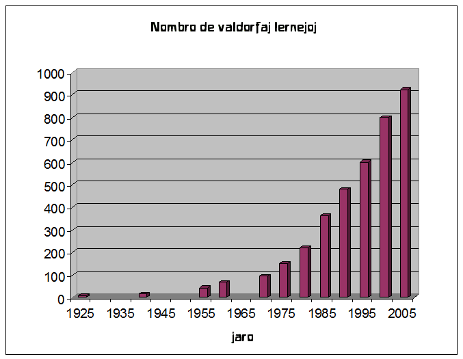 Kresko de valdorfaj lernejoj anglalingva versio: :file:Waldorf-schools-growth.png Kreinto: Vikipediisto Hgilbert (anglalingva) Atentu ke la literaro uzata en la grafikaĵo, nomiĝanta "Waldorf", estas tute specifa pri publikaĵoj valdorfpedagogiaj kaj pli vastsence antropozofiaj.